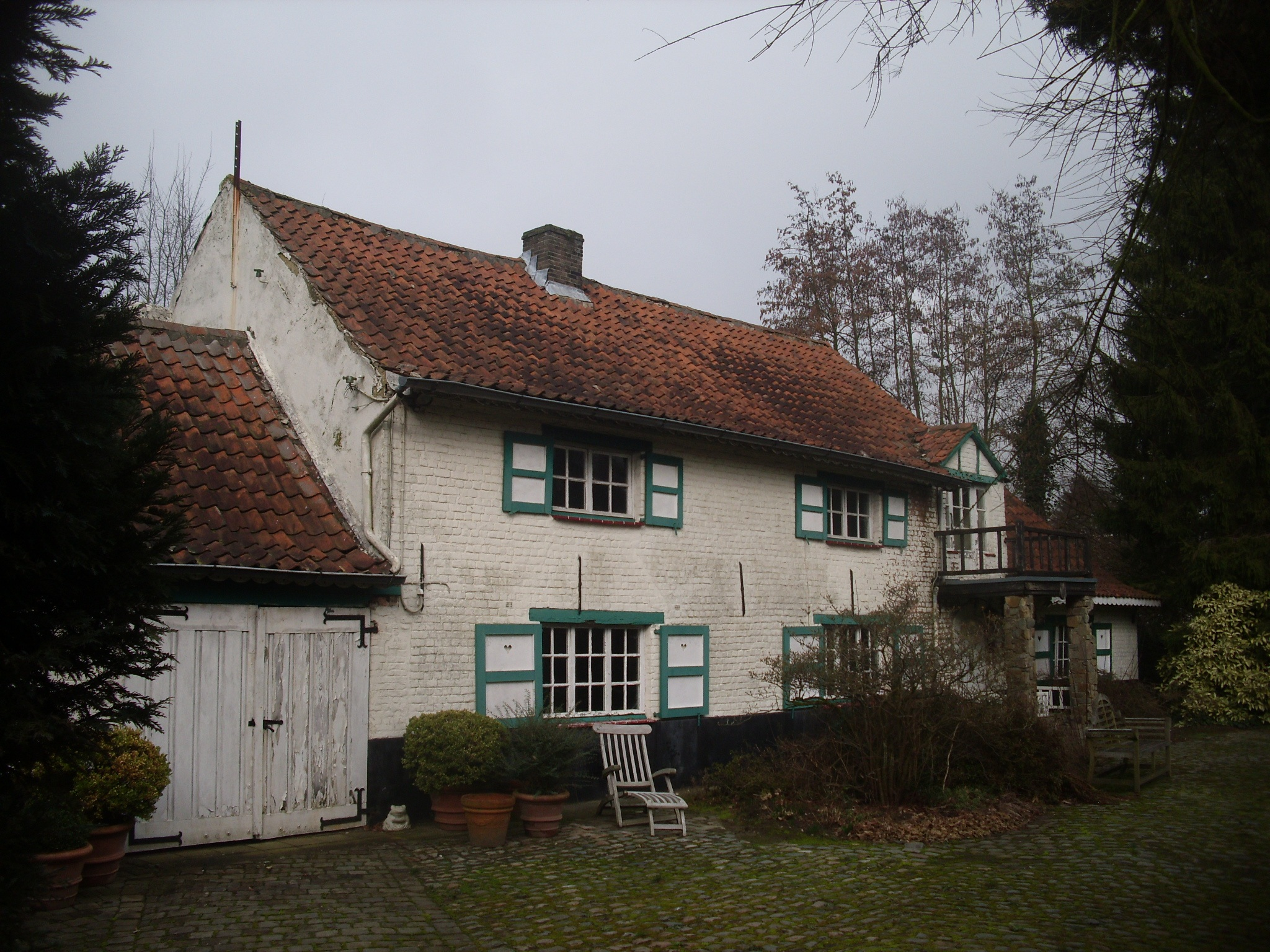 Woning van kunstschilder Leon De Smet (1881-1966) die er woonde van 1906 tot 1913 - Koperstraat - Sint-Martens-Latem - Oost-Vlaanderen - België